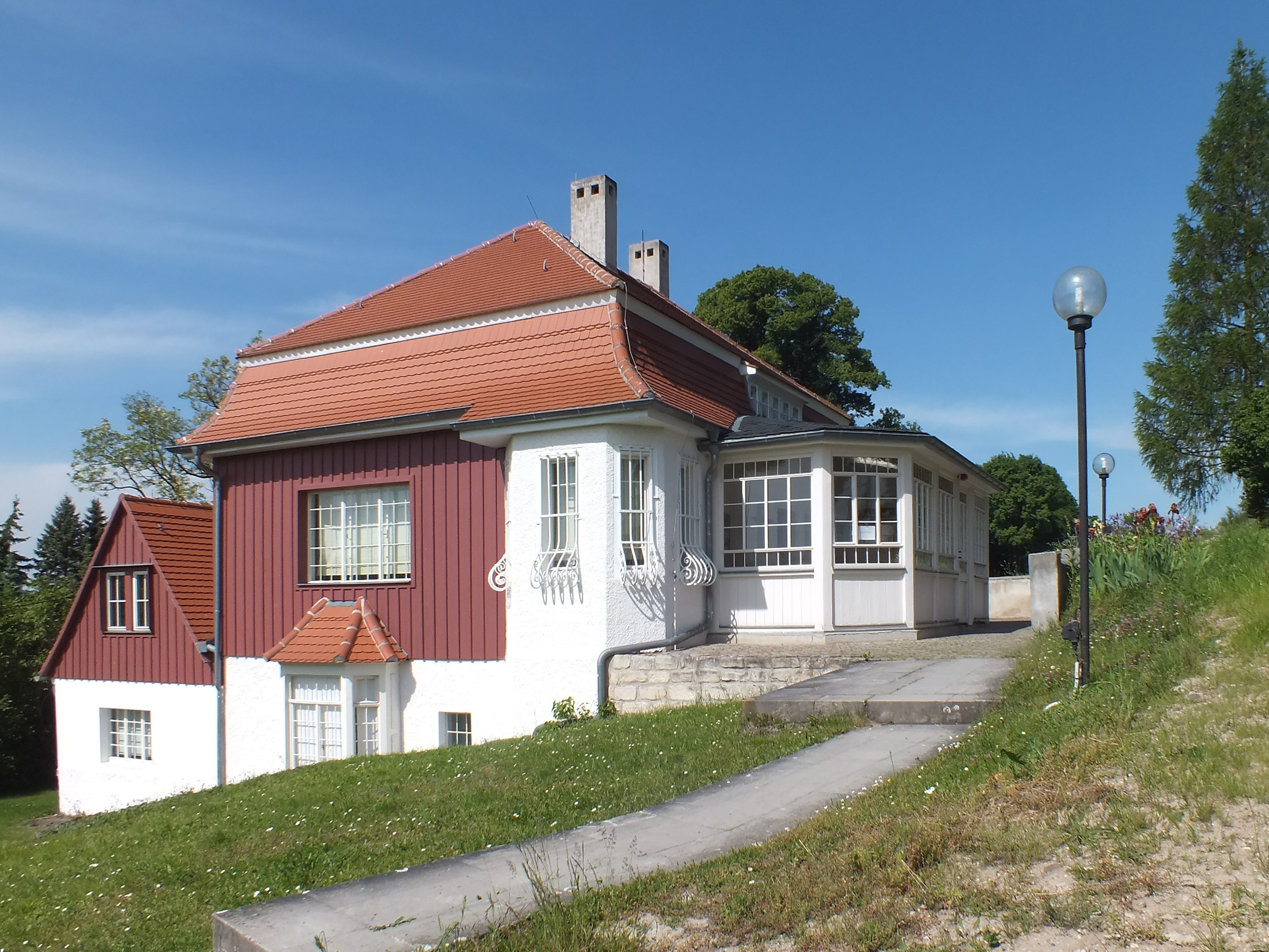 Das Weinberghaus in Großjena, auch Max-Klinger-Haus